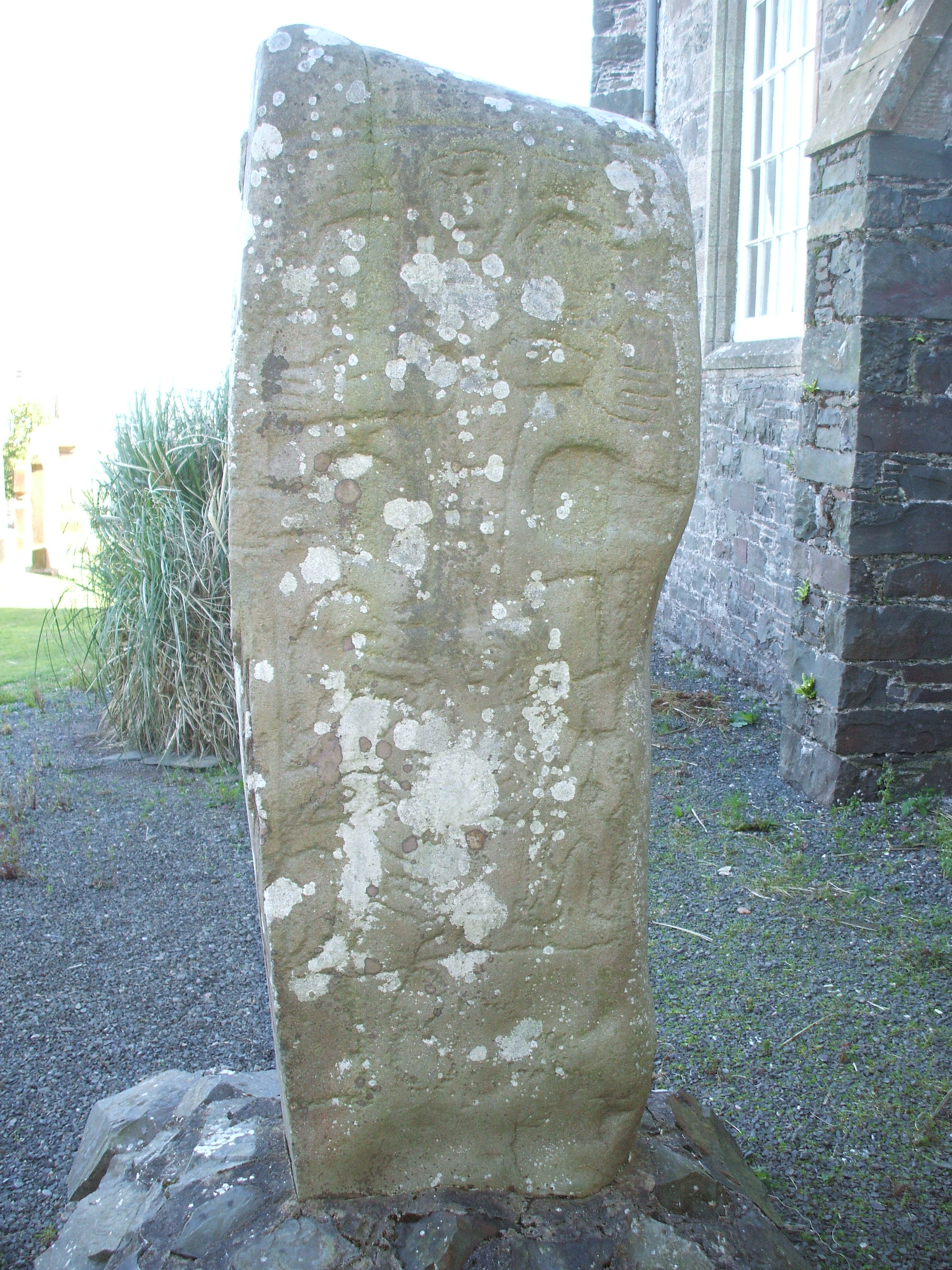 wie Kilmorie stone1, aber Rückseite abgebildet